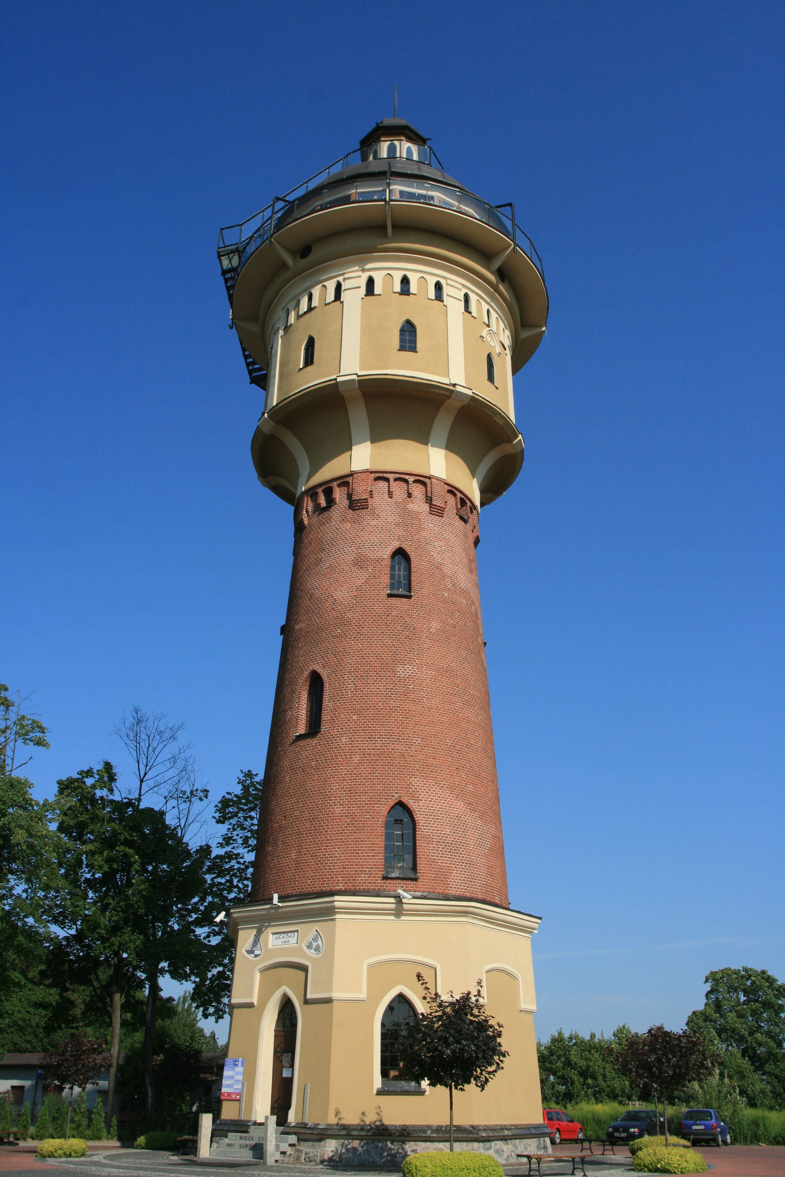 Gołdap, Poland